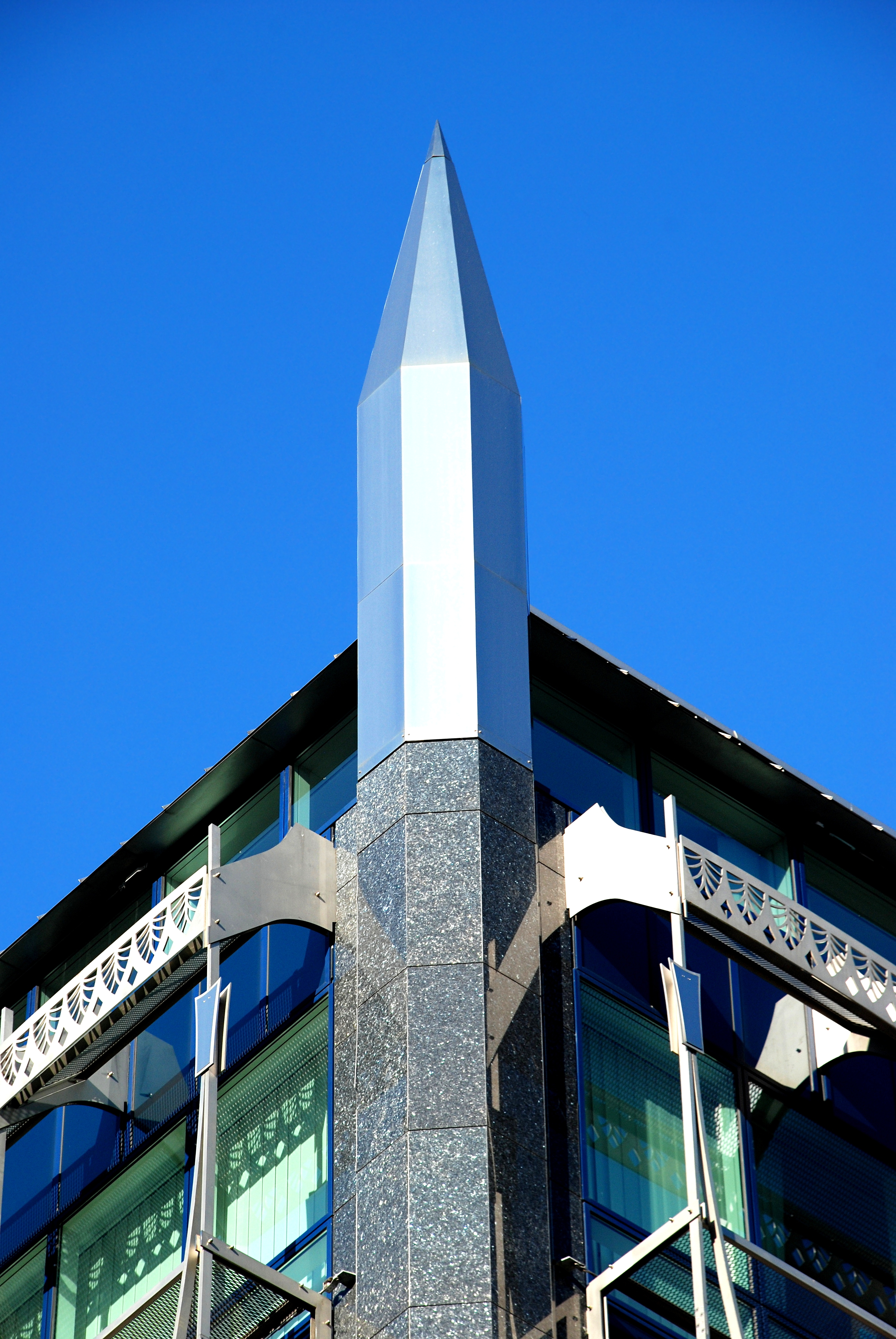 Belgique - Bruxelles - Immeuble Sapphire (Architecture postmoderne en Belgique - Atelier d'architecture de Genval - 2003)